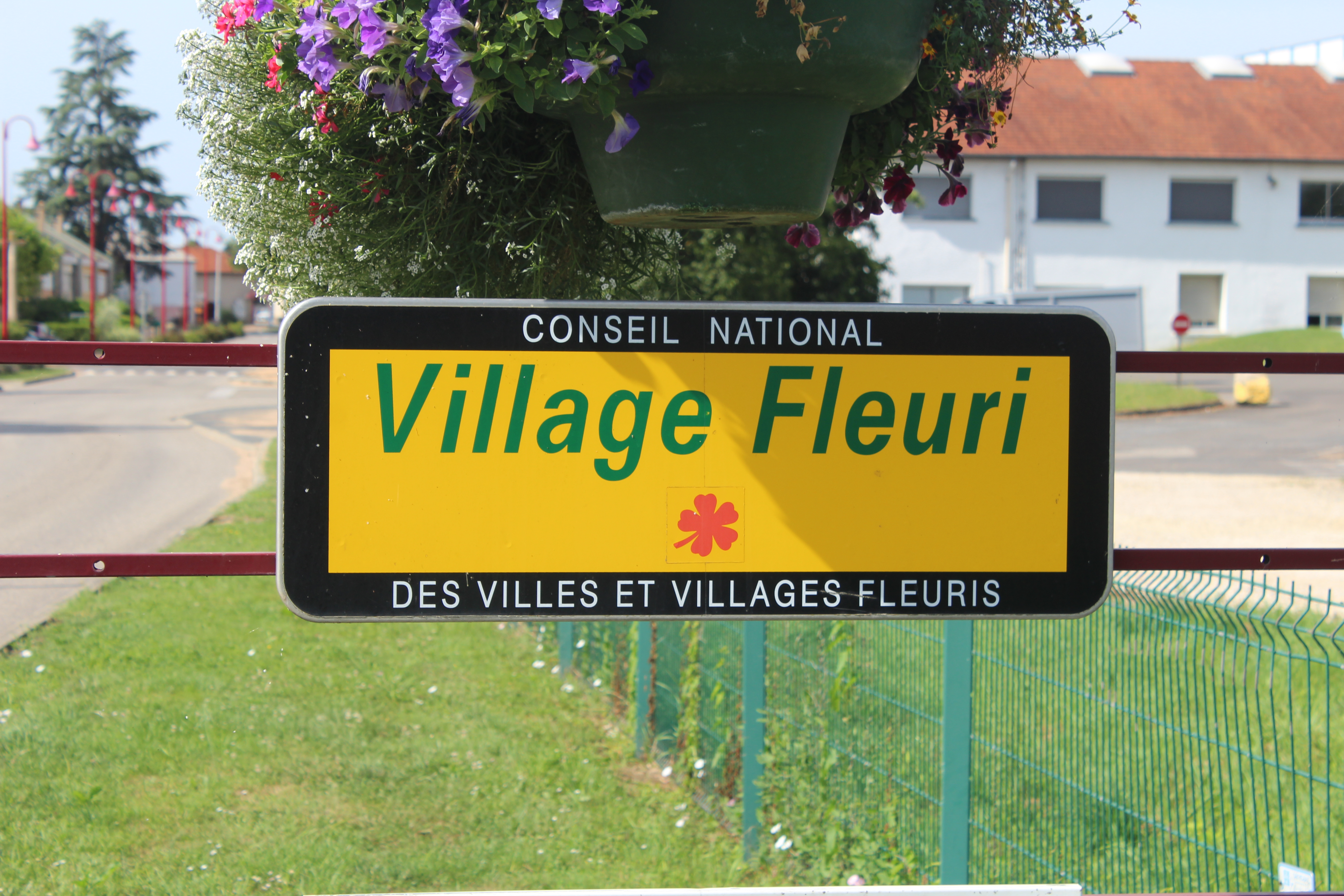 Panneau village fleuri avec une fleur à Grièges.